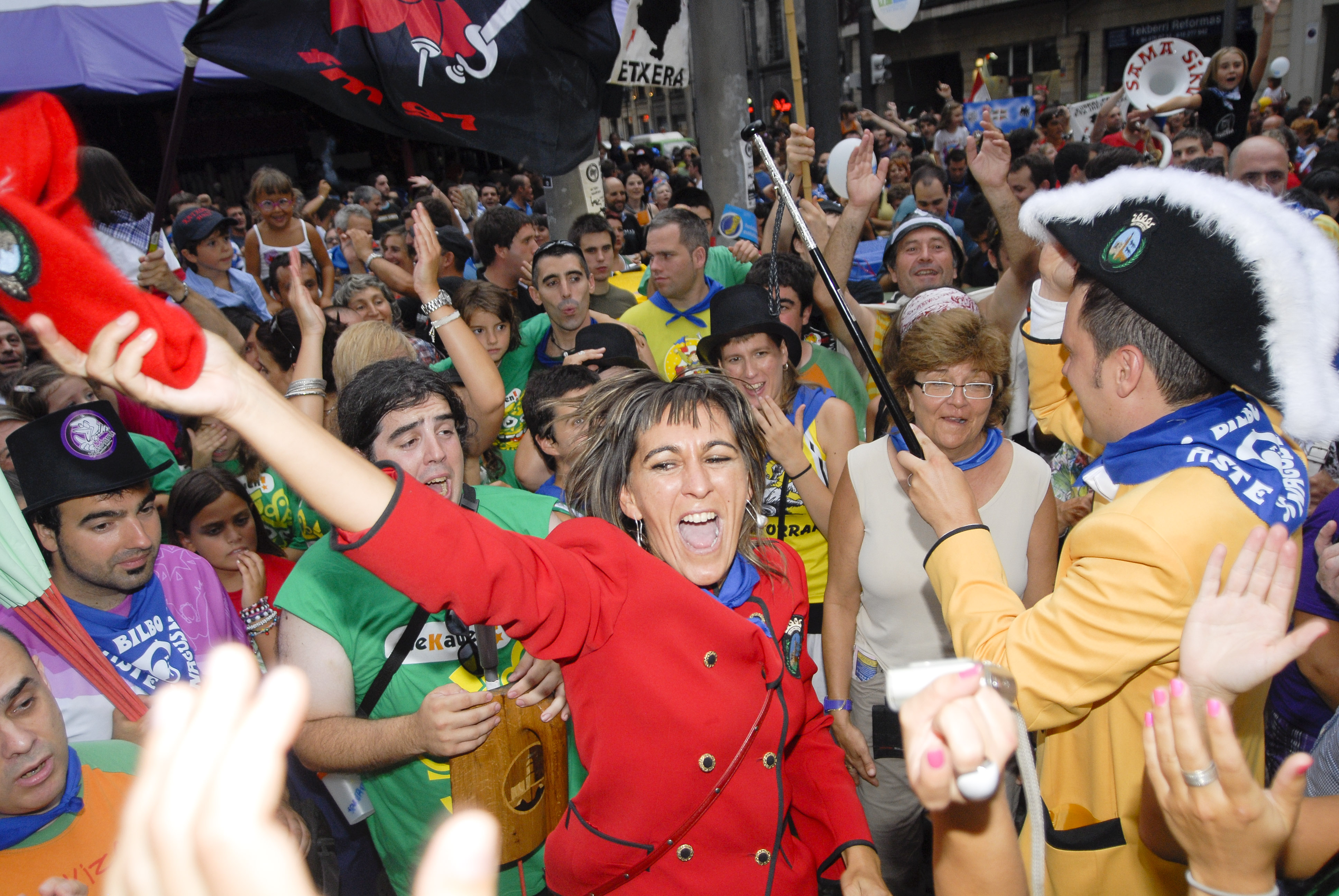 Larunbata20-81